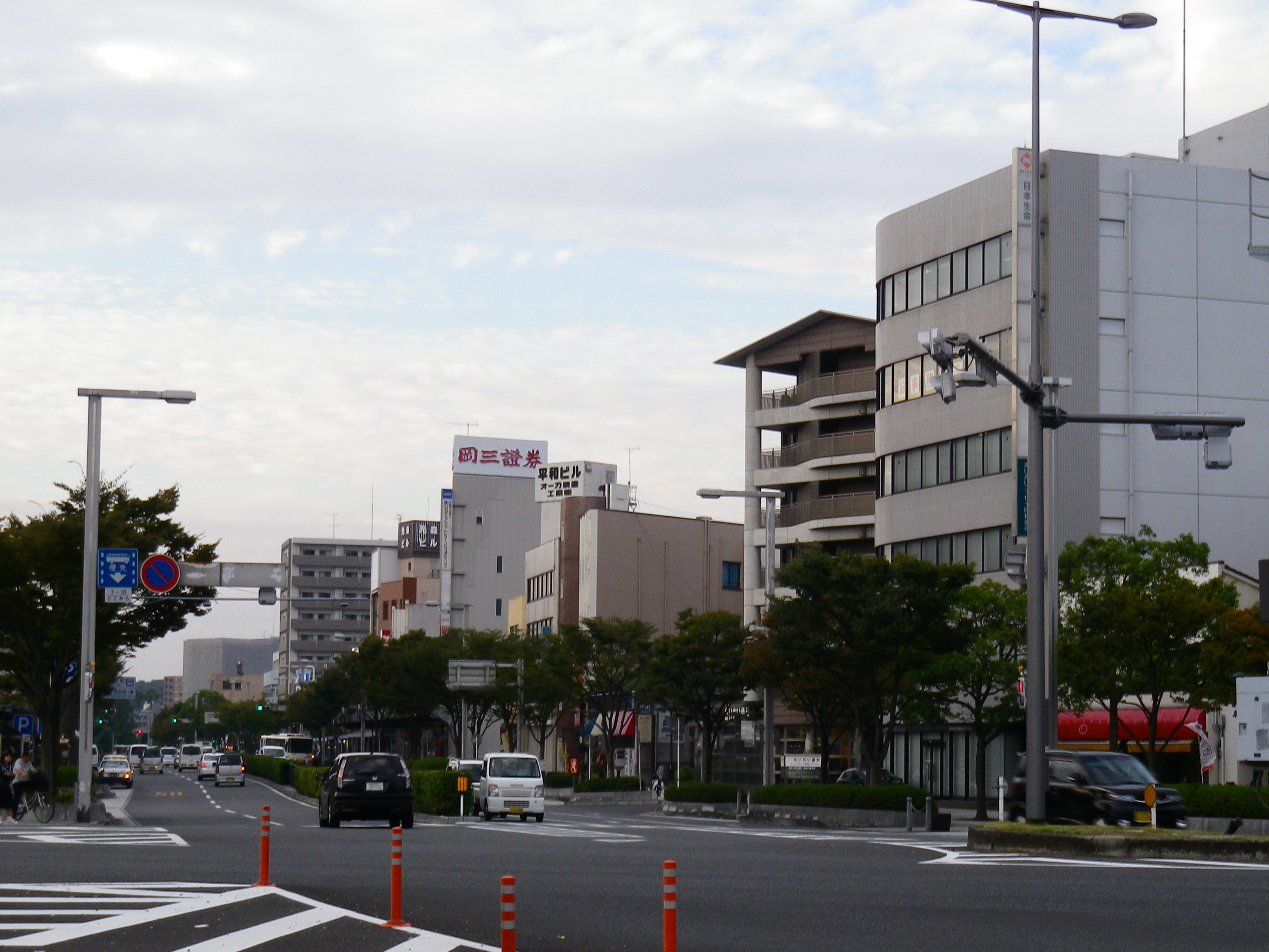 山口県宇部市。国道190号中央町交差点から平和通り方向を撮影。